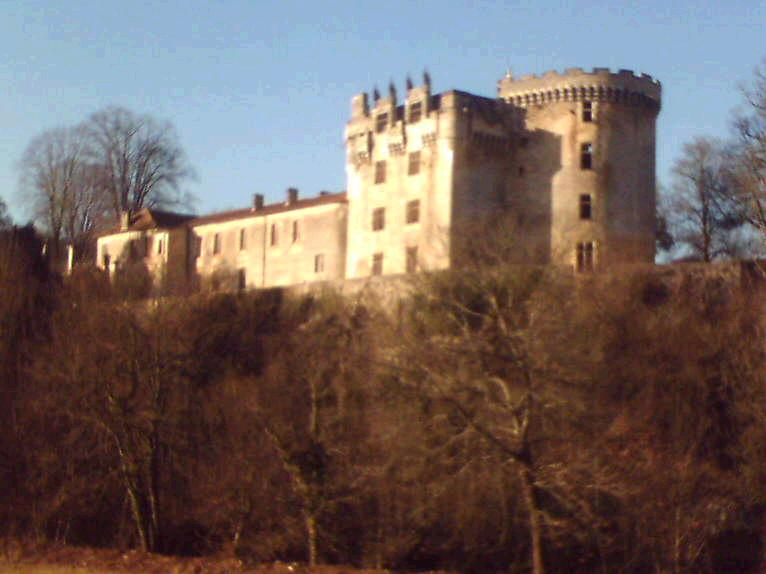 Schloss von La Chapelle-Faucher, Département Dordogne, Frankreich.